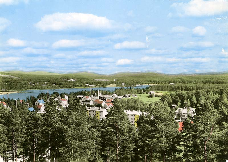 Utsikt över Skolbyn från kyrktornet. Handkolorerad variant av ac01233.; Miljöer; Tätort